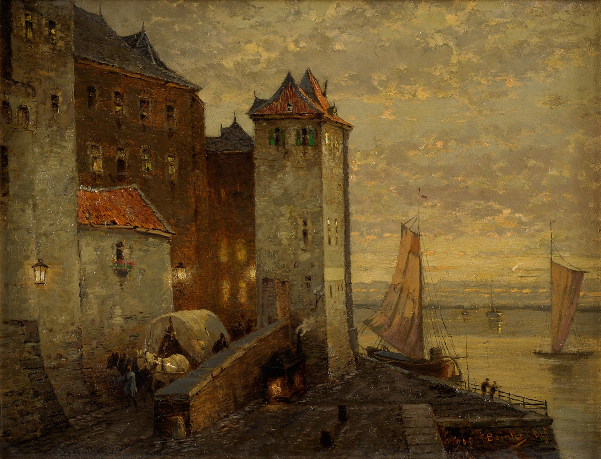 Das alte Kohlentor in Düsseldorf. Signiert. Datiert 1902. Öl/Lwd., 34 x 45 cm.